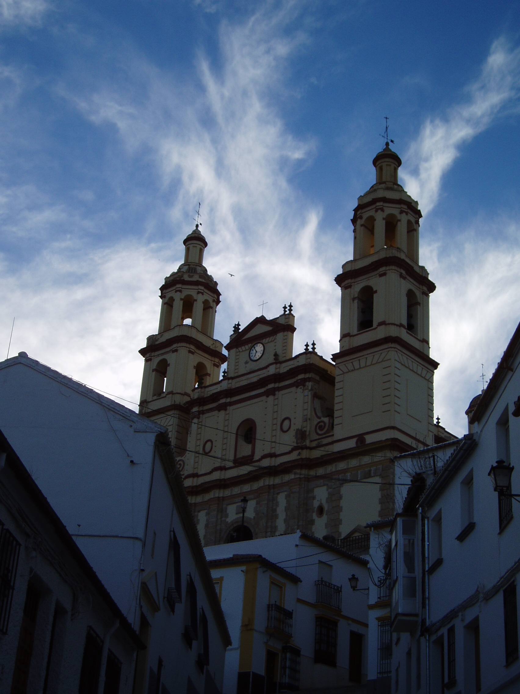 Nuestra Señora de la Encarnación, iglesia neoclásica en Olvera, municipio de la Sierra de Cádiz, Andalucía, España.